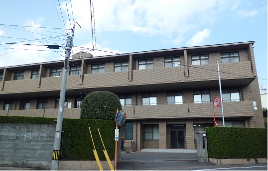 長崎カトリック神学院